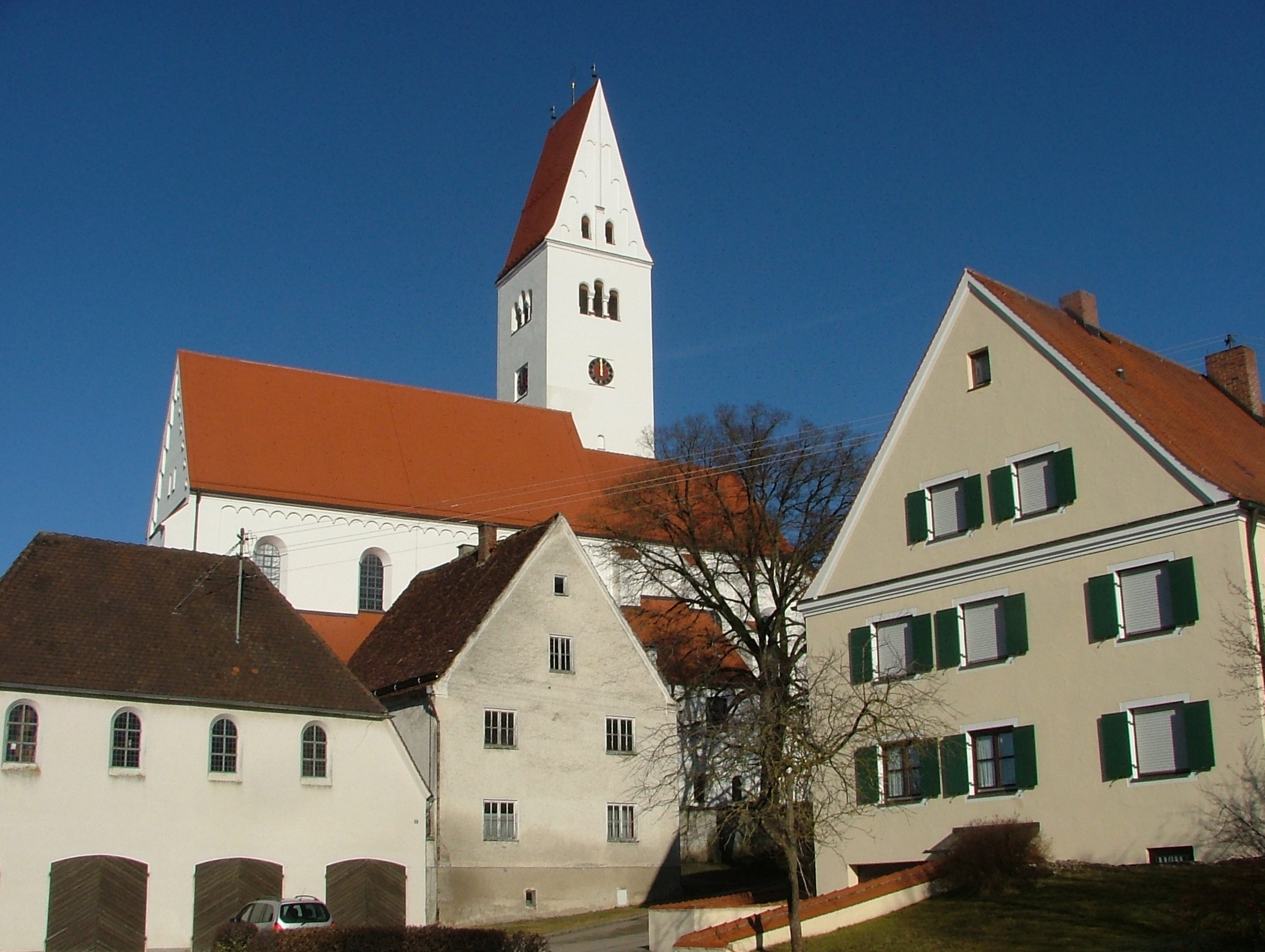 Kirchhaslach